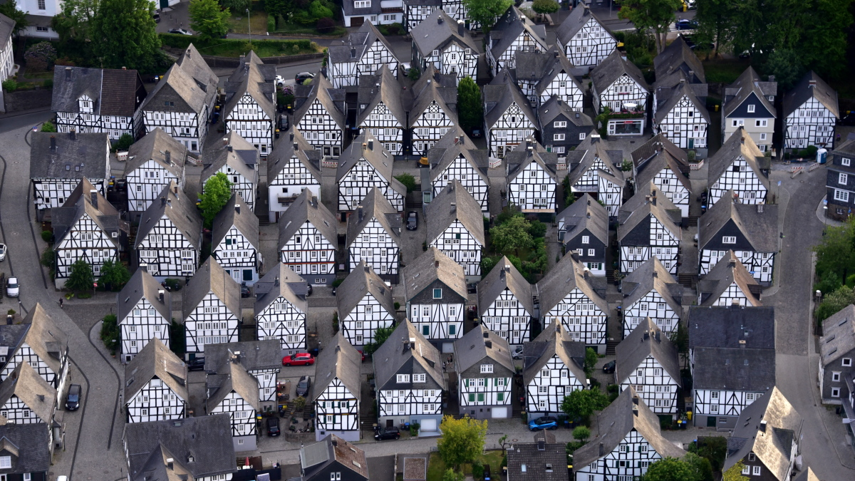 Freudenberg (Siegerland)